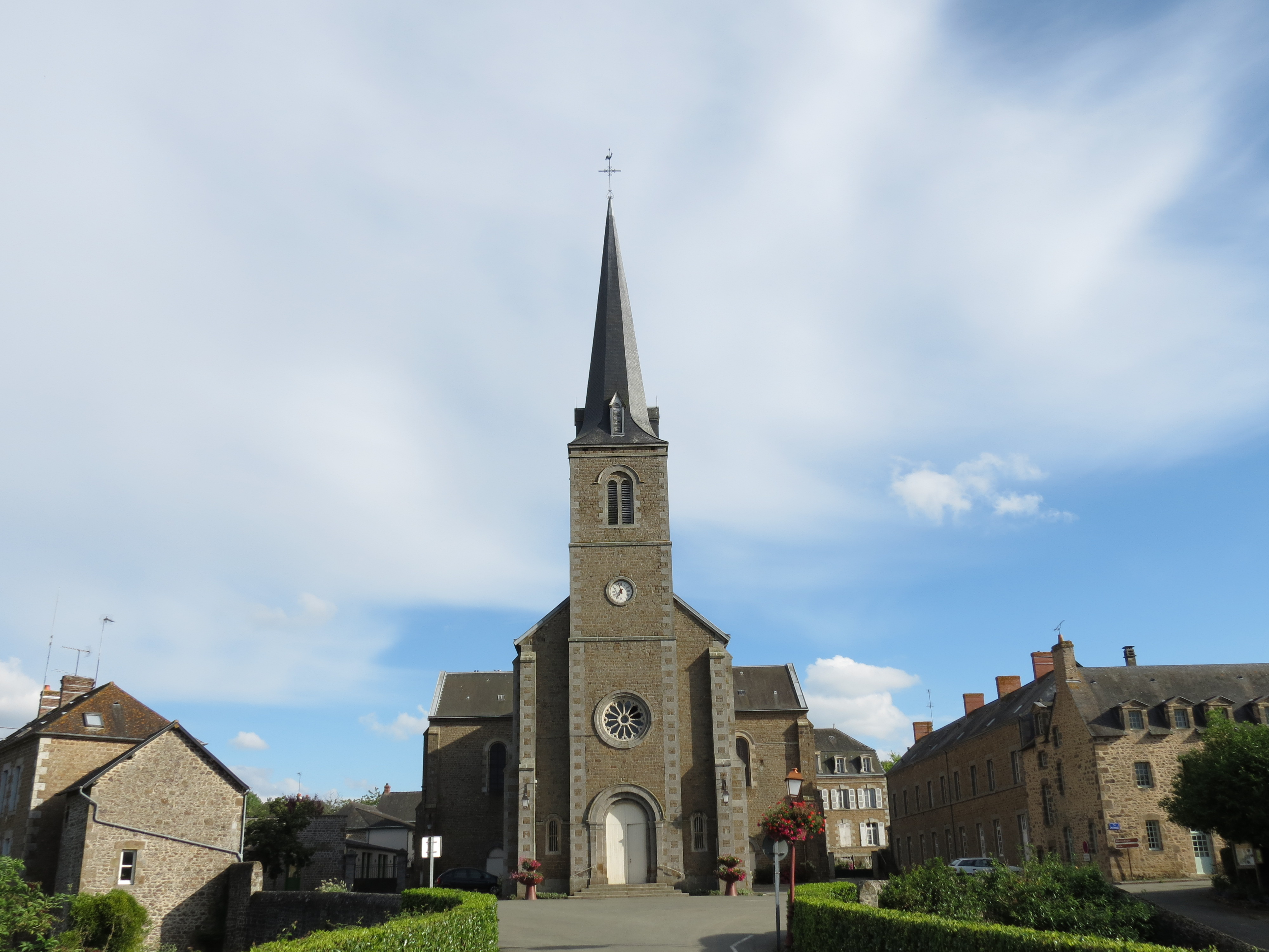 Eglise de Lassay